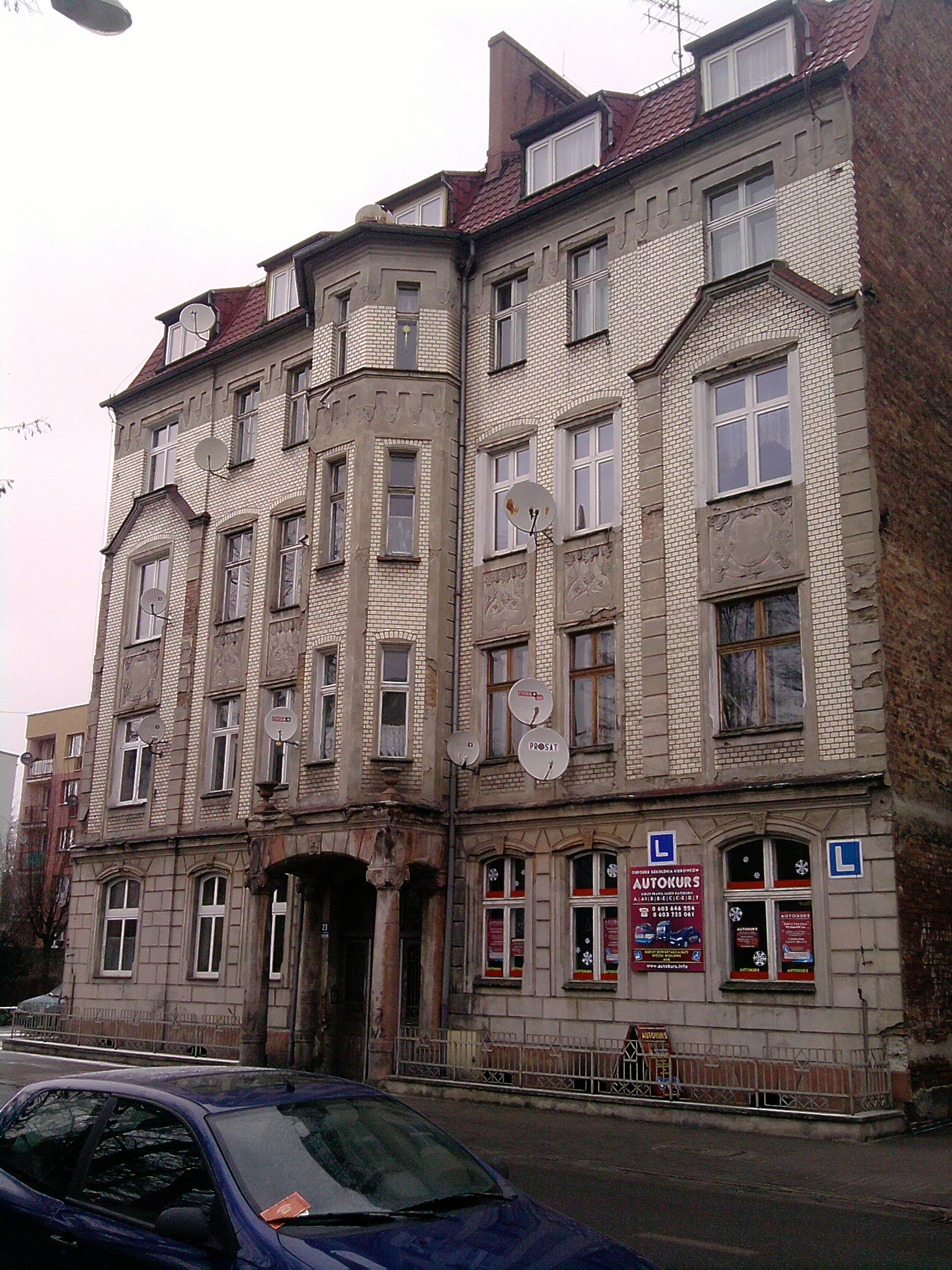 Racibórz, ul. Ogrodowa 23 - kamienica, ok. 1910 (zabytek nr A/1521/93 z 30.04.1993)